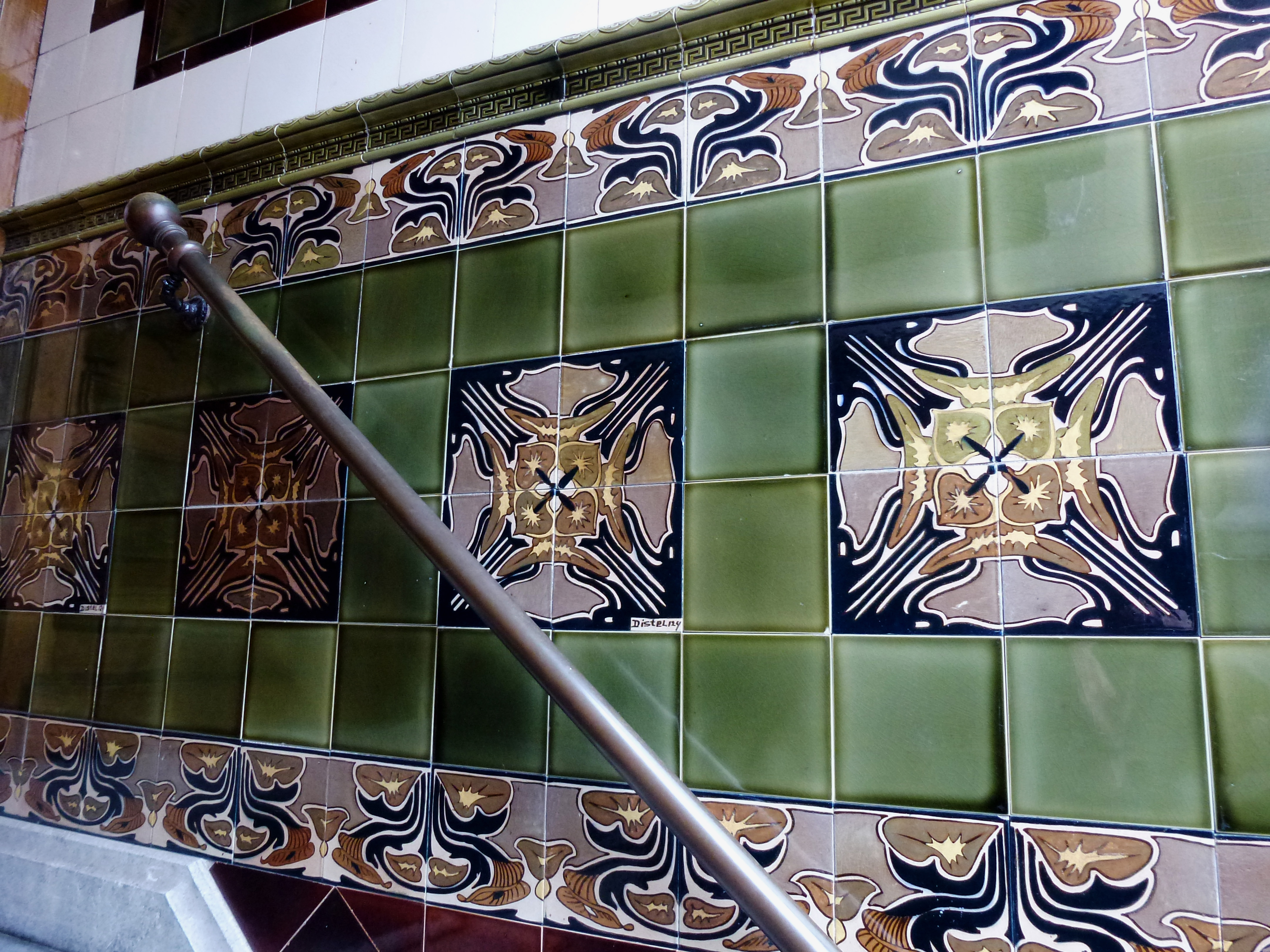 Portiek met geglazuurde siertegels van Plateelfabriek De Distel